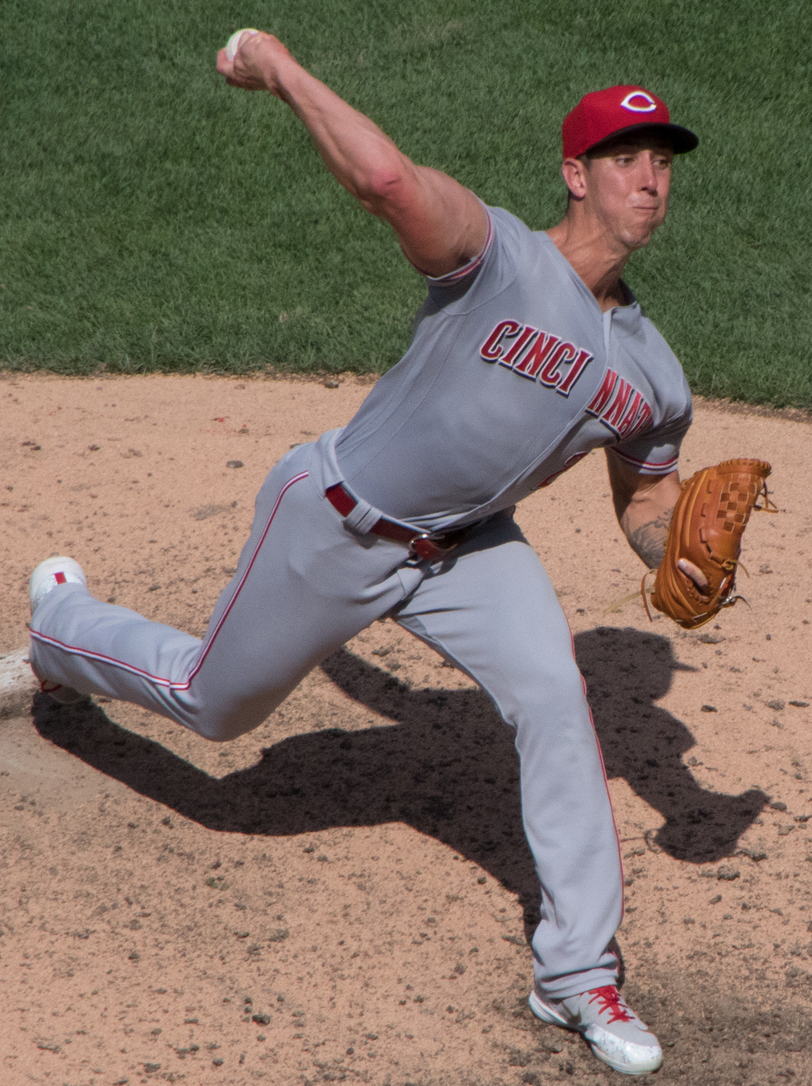 Michael Lorenzen